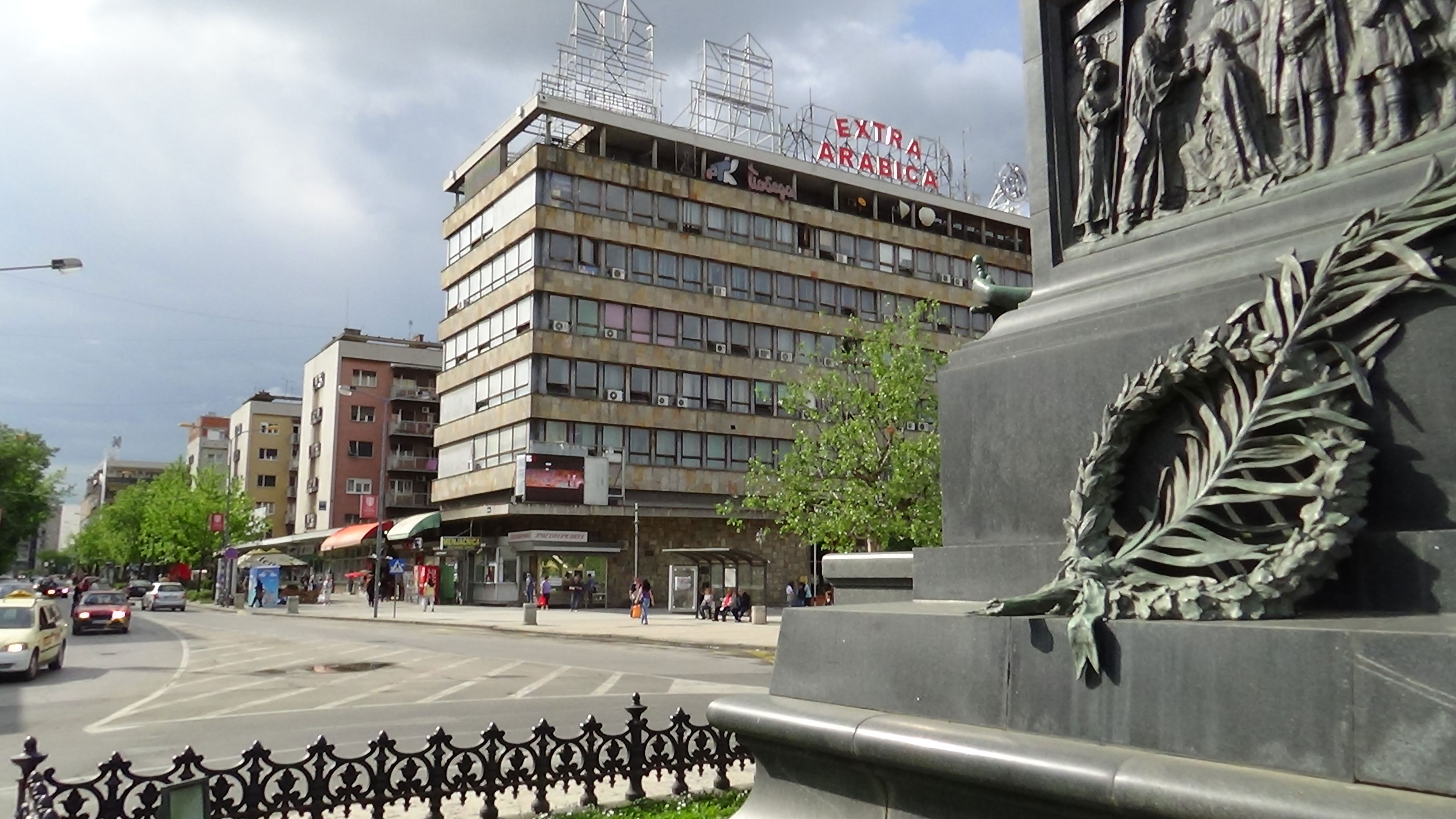 Zgrada biblioteke Kruševac.